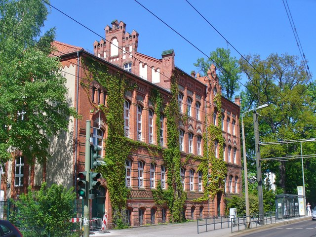 Berlin - Gruenauer Schule